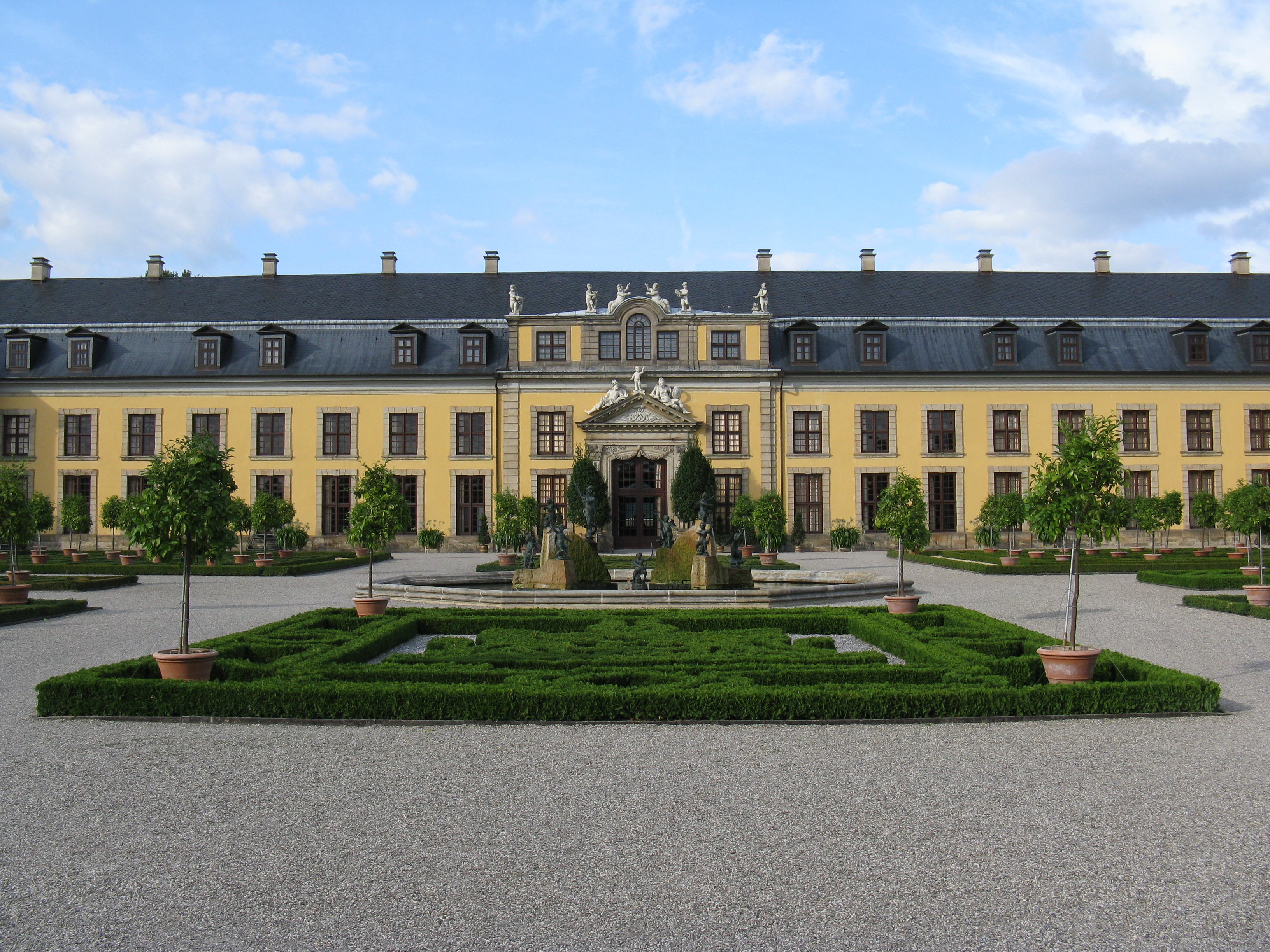 Großer Garten in Hannover-Herrenhausen: Galeriegebäude